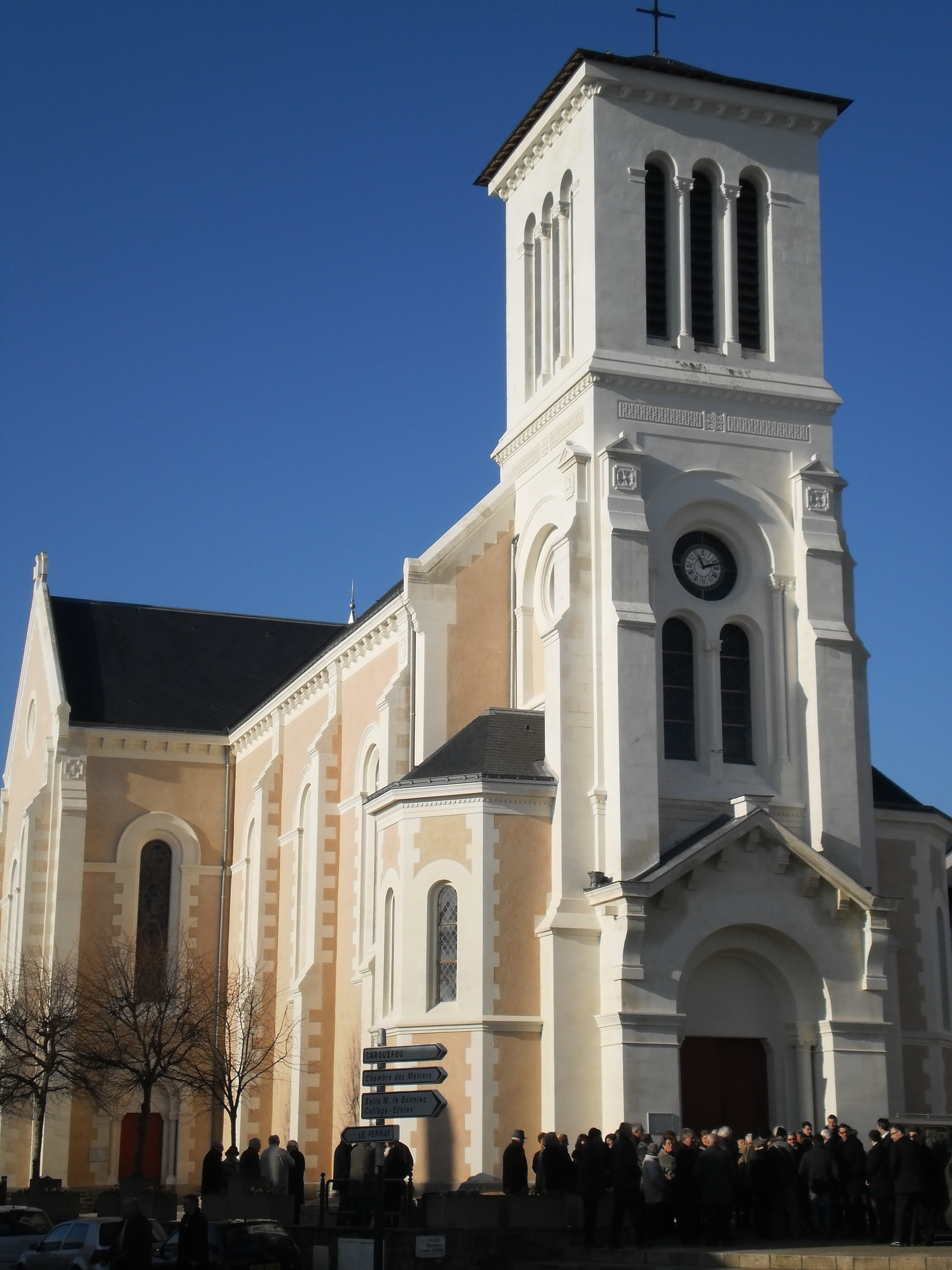 Église Sainte-Lucie - Sainte-Luce-sur-Loire (Loire-Atlantique, France). Achevée en 1876, elle est l’œuvre de l'architecte nantais Liberge. Le clocher est construit en 1897.